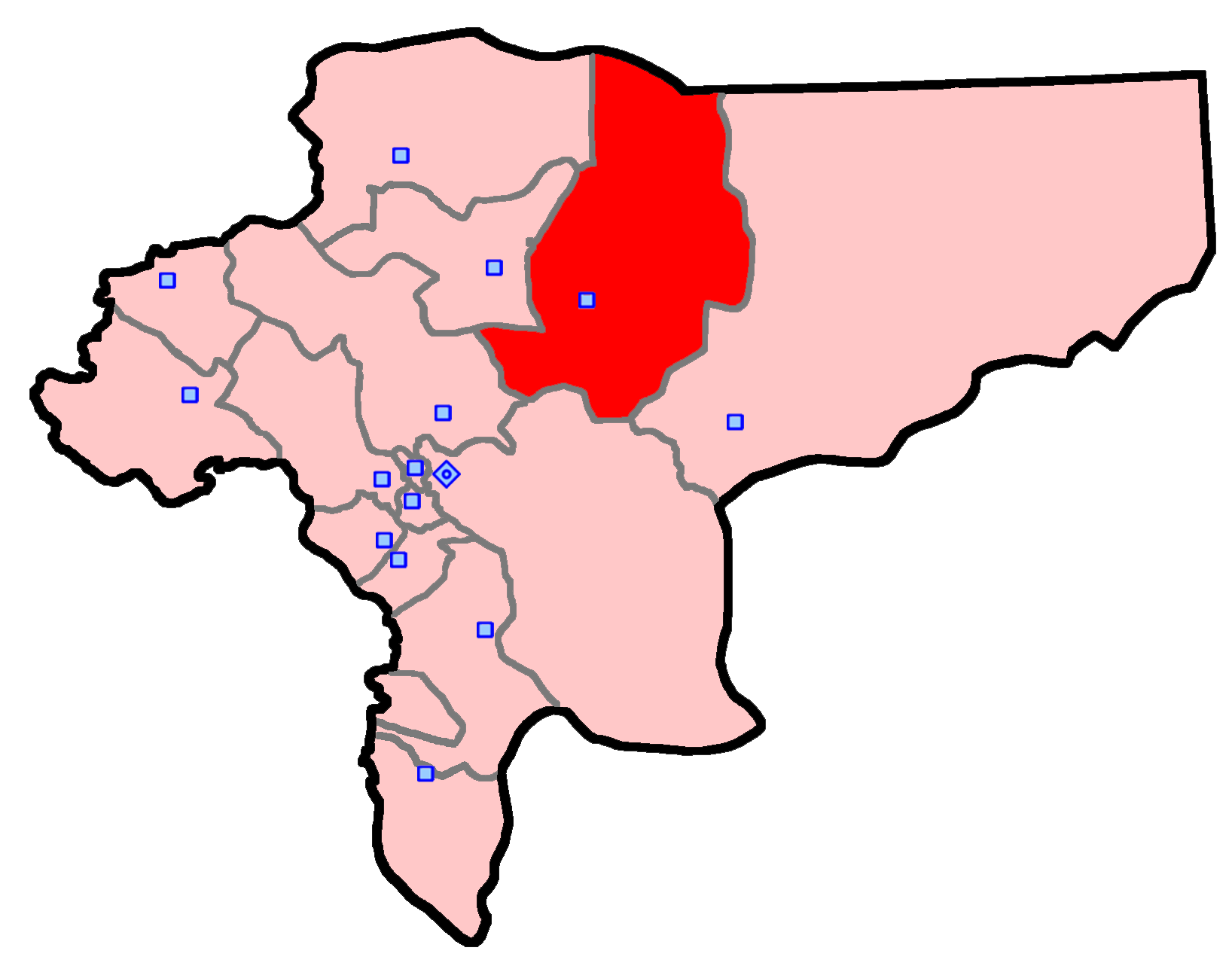 حوزهٔ انتخاباتی اردستان برای انتخابات مجلس شورای اسلامی